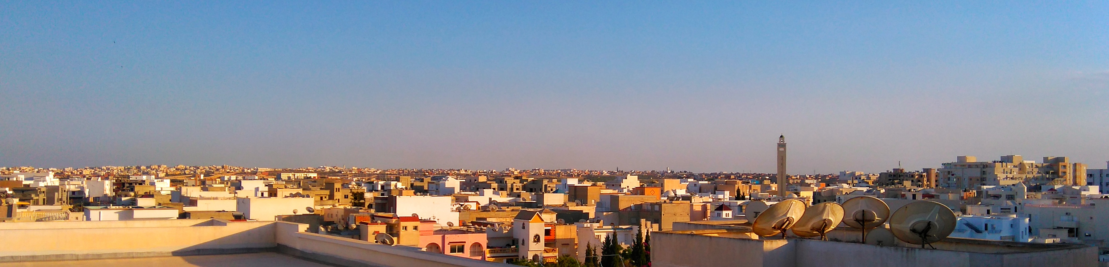 Vue panoramique de la ville de Sousse, Sahloul